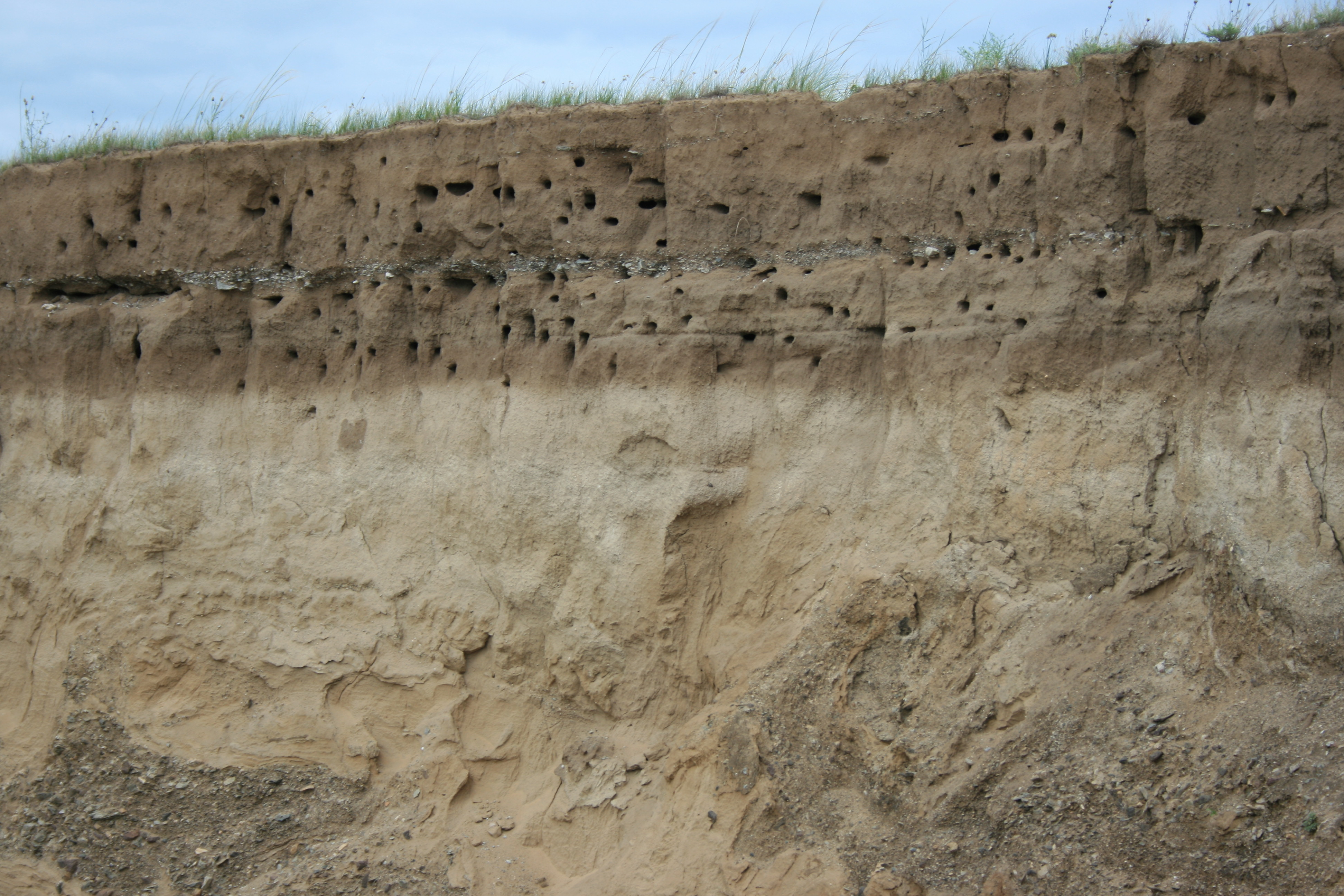 Гнезда стрижей. Зарубино (Джидинский район)